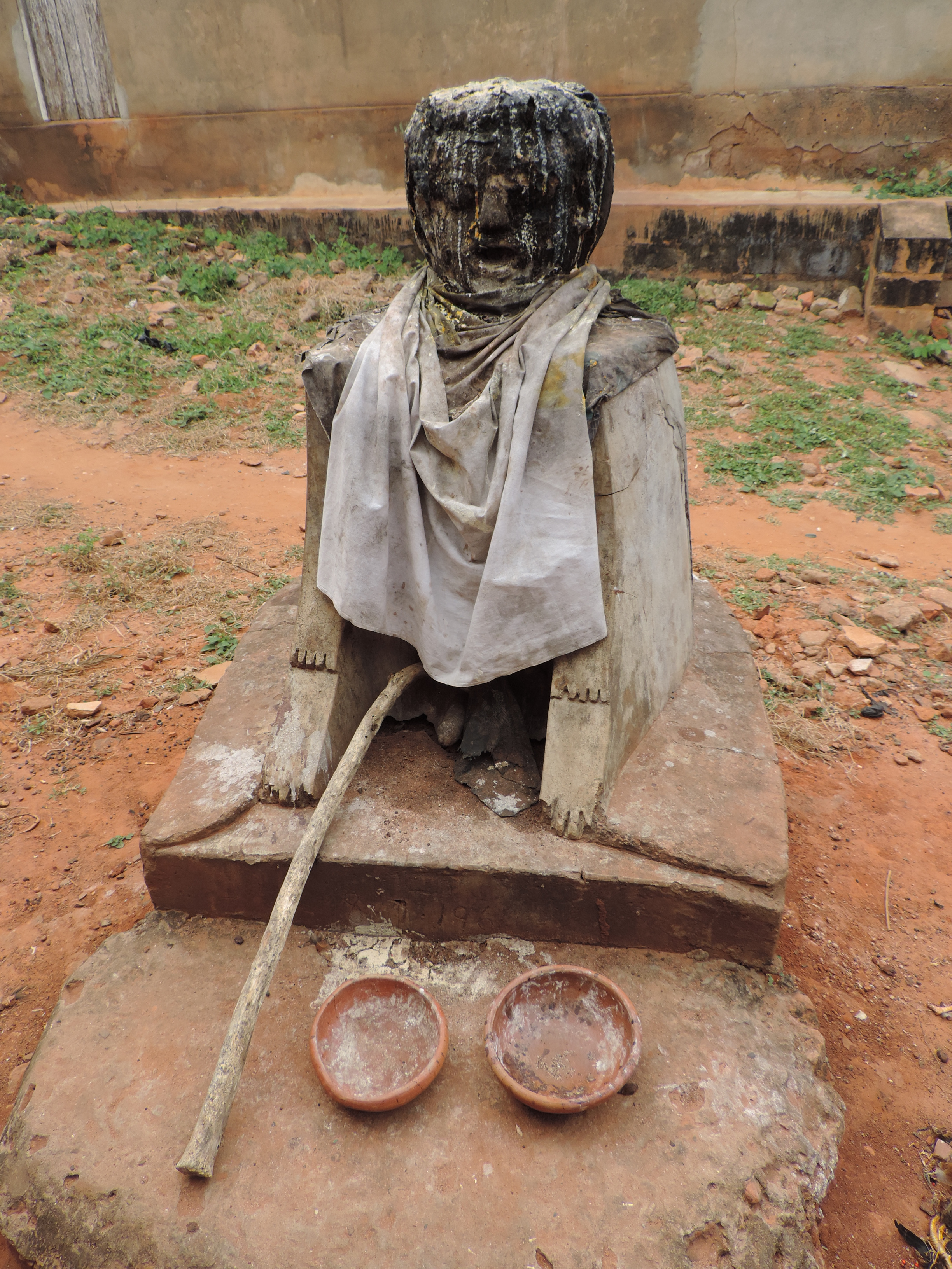 Autel vaudou à Togoville, Togo